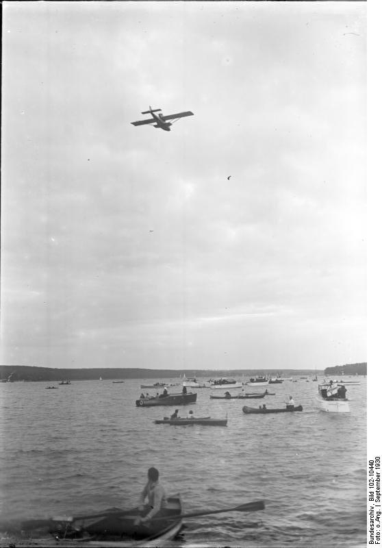 Der jubelde Empfang des deutschen Ozean-Bezwingers von Gronau auf dem Templiner See in Potsdam! Die Ankunft Gronau´s über dem Templiner See in Potsdam.